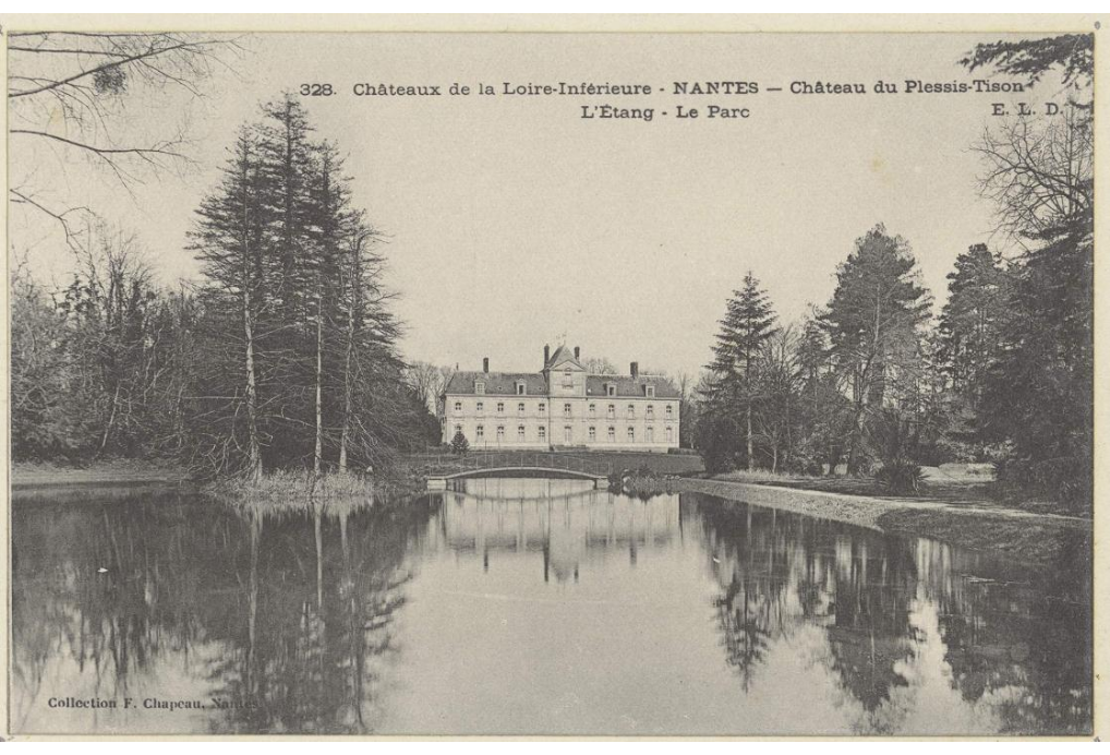 Nantes - Château du Plessis-Tison - L'étang - Le parc